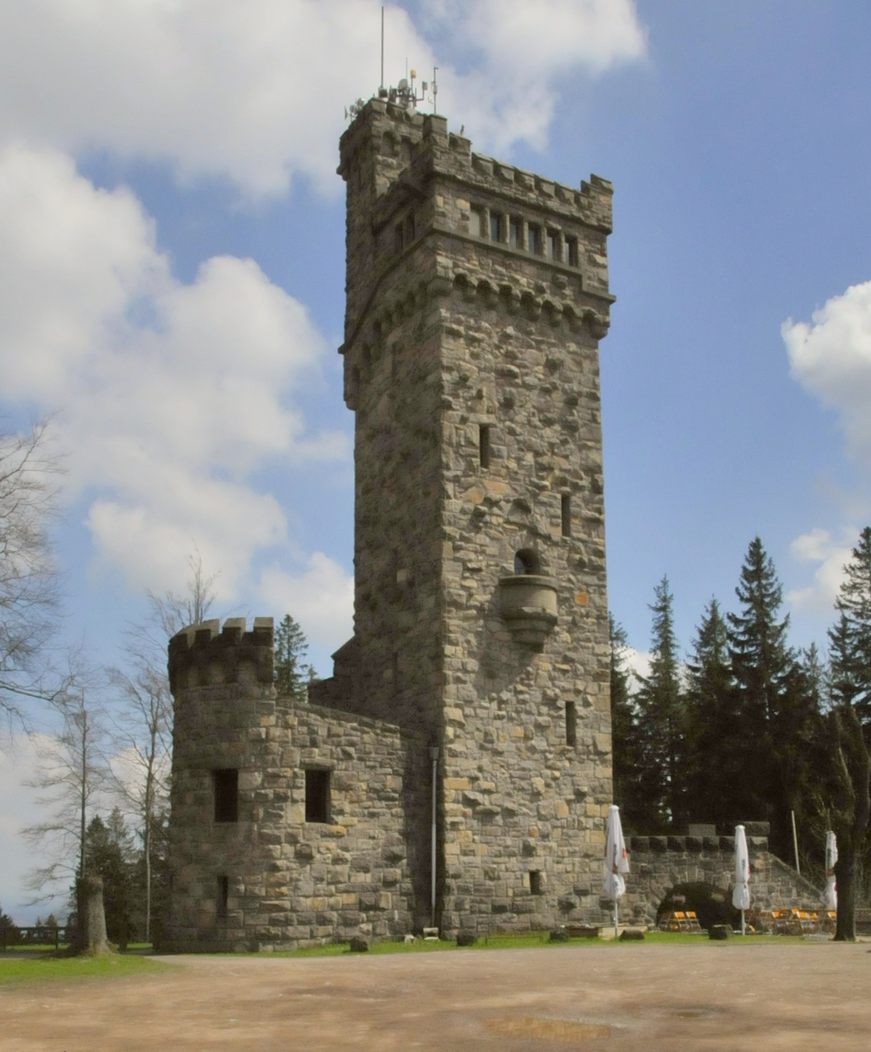 Aussichtsturm „Carl-Eduard-Warte“ auf der Hohen Warte bei Elgersburg, Thüringen; erbaut 1910-1911